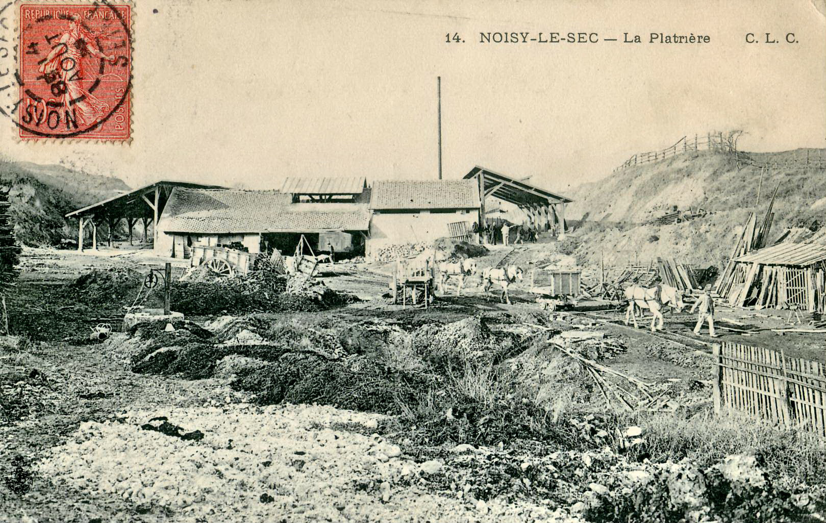 carte postale ancienne éditée par CLC, N°14 Noisy-le-Sec : la Plâtrière